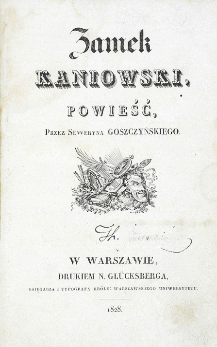 Okładka powieści "Zamek kaniowski!